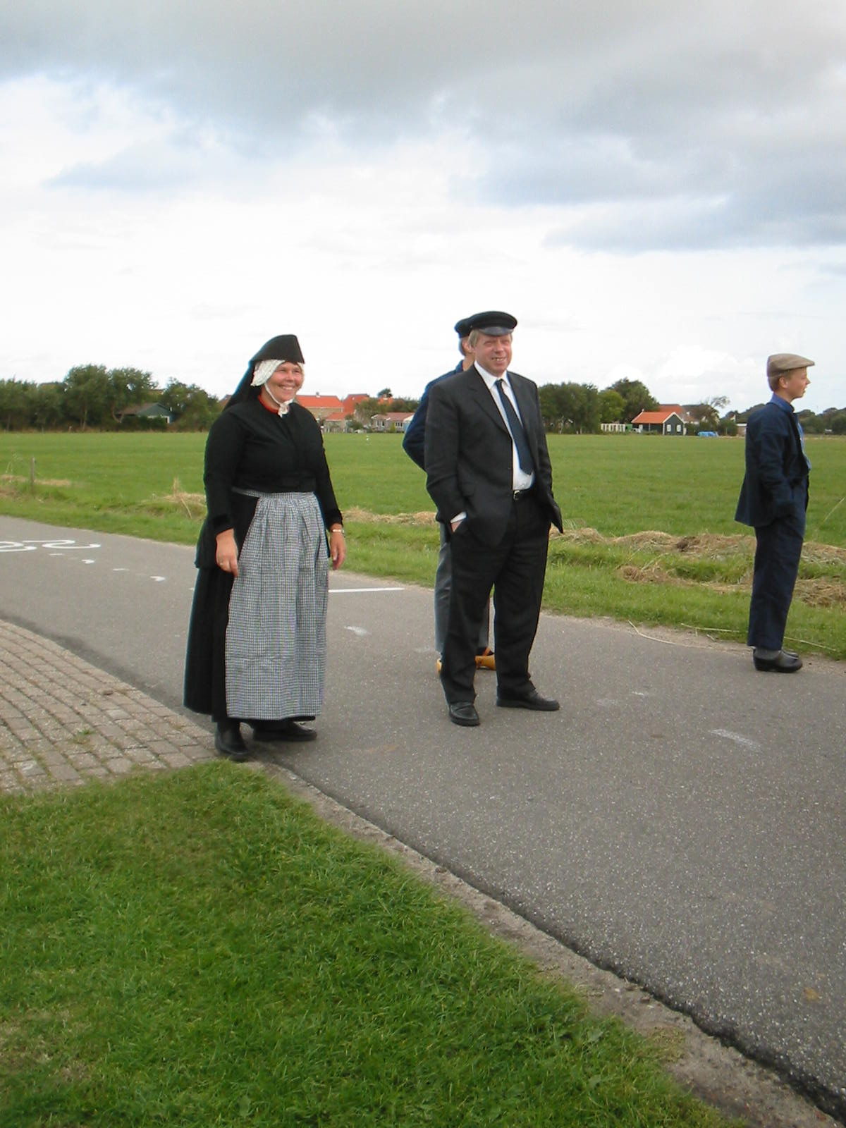 Kledingdracht van Terschelling